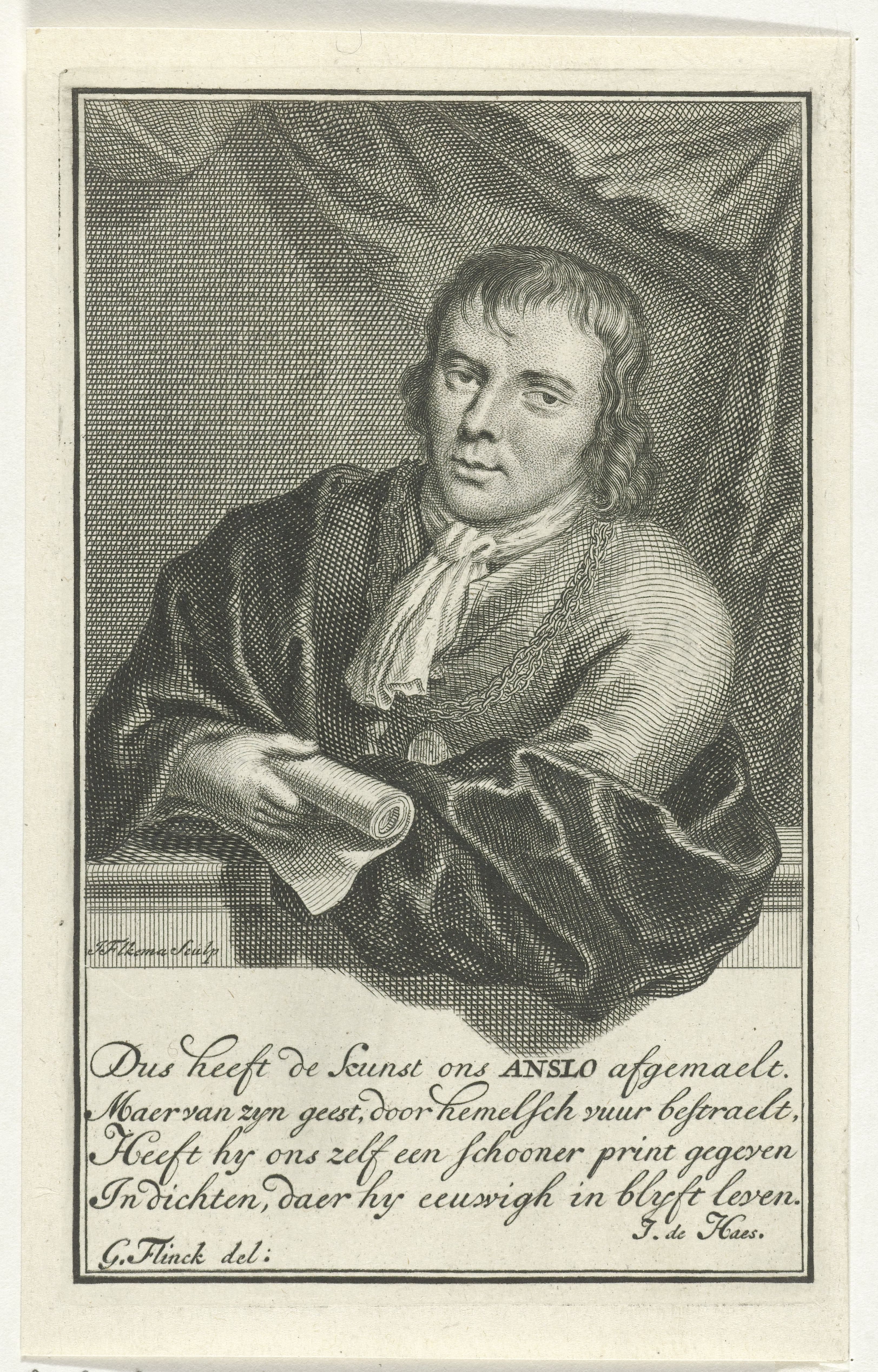 Portret van Reyer Anslo (1622–1669), Nederlands dichter.